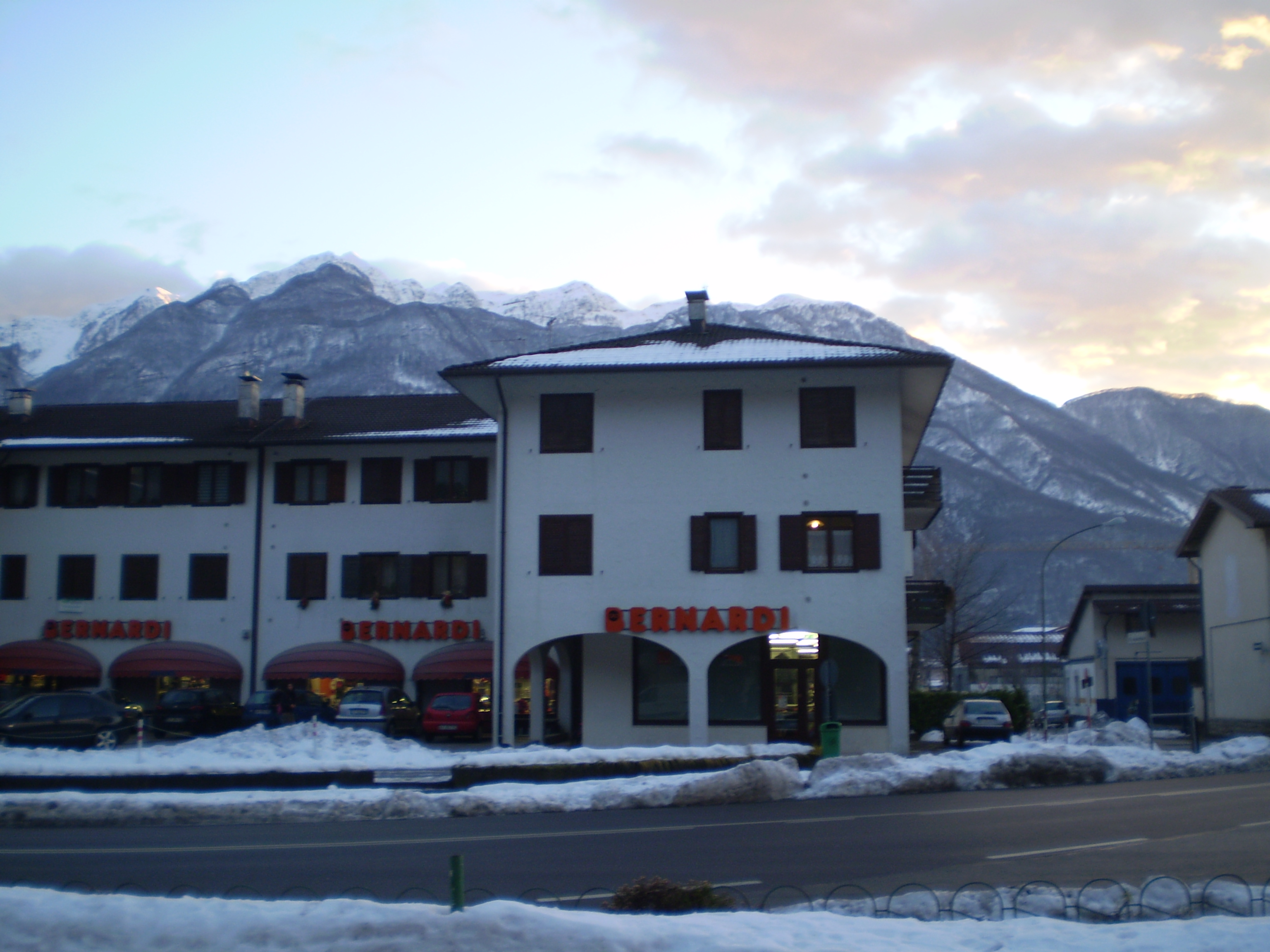 Scorcio invernale di Villa Santina (provincia di Udine)